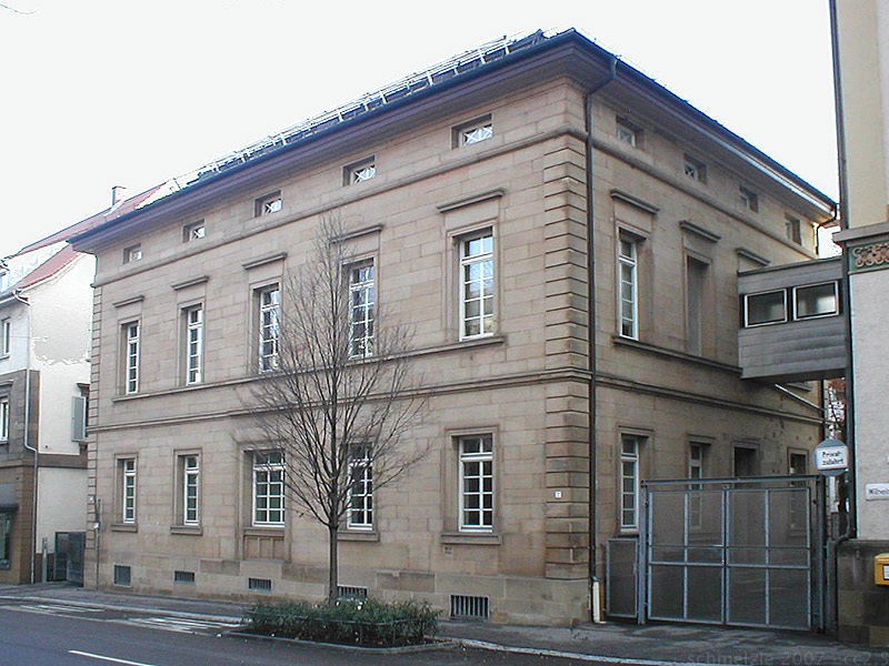 Villa Goppelt in der Wilhelmstr.7 in Heilbronn